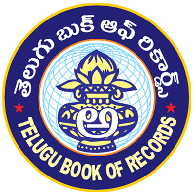 TELUGU BOOK OF RECORDS FOR WORLD WIDE TELUGU PEOPLE